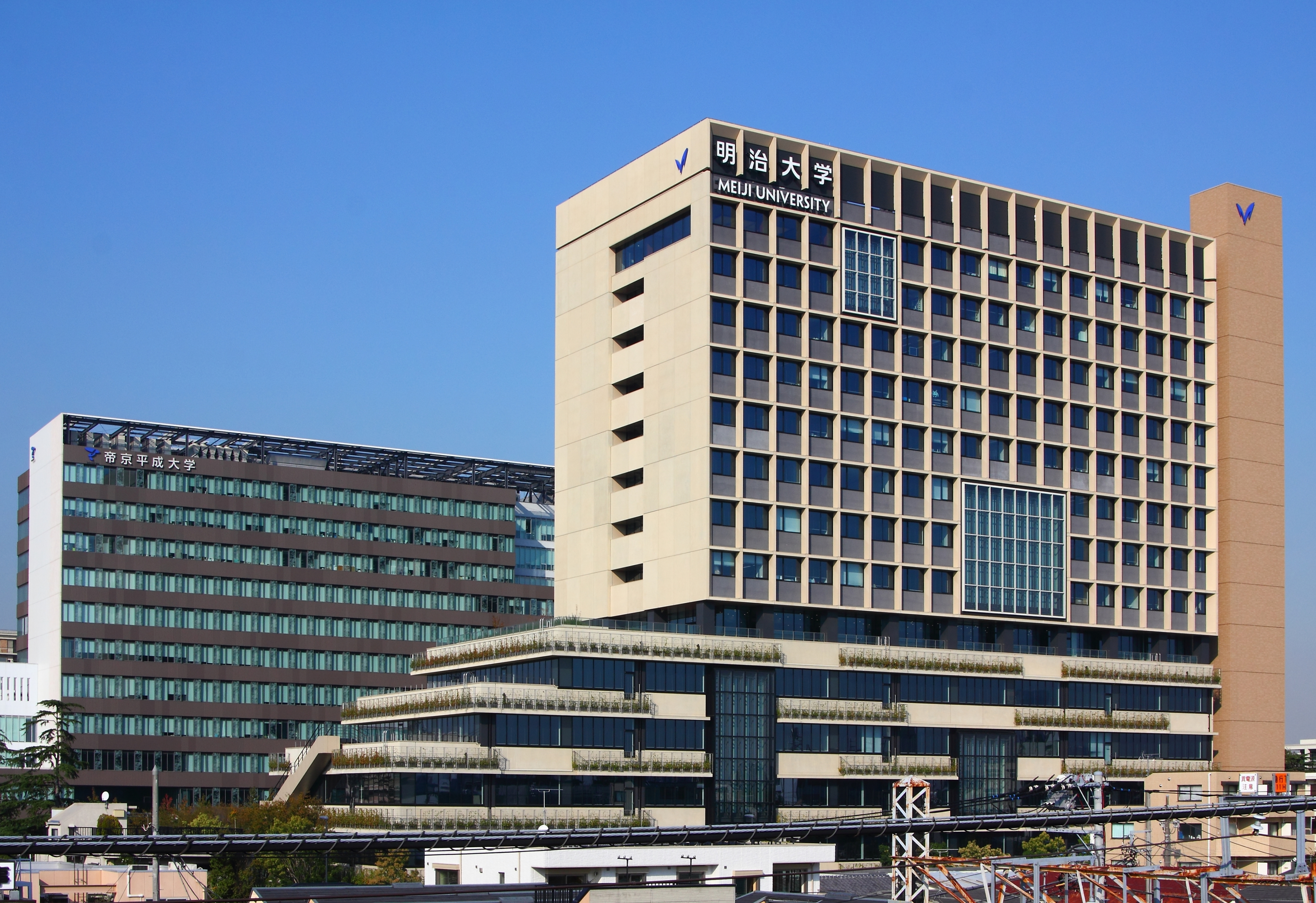 明治大学中野キャンパス、帝京平成大学。（東京都中野区）